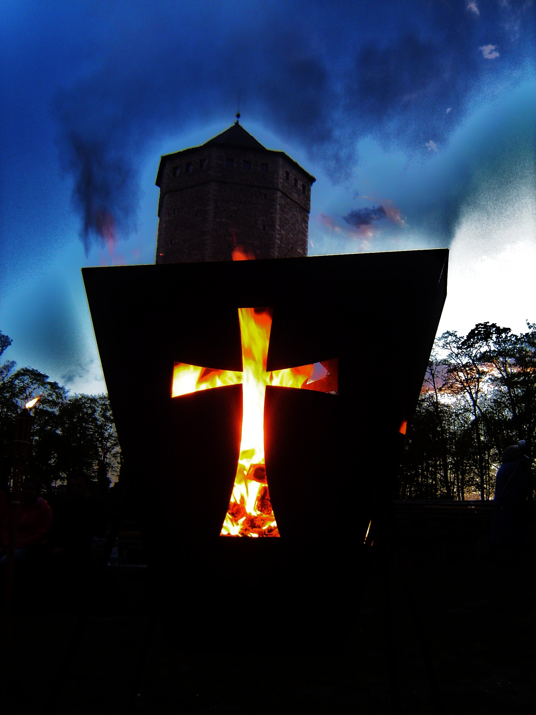 Jüriöö ülestõsu 665. aastapäev Paides